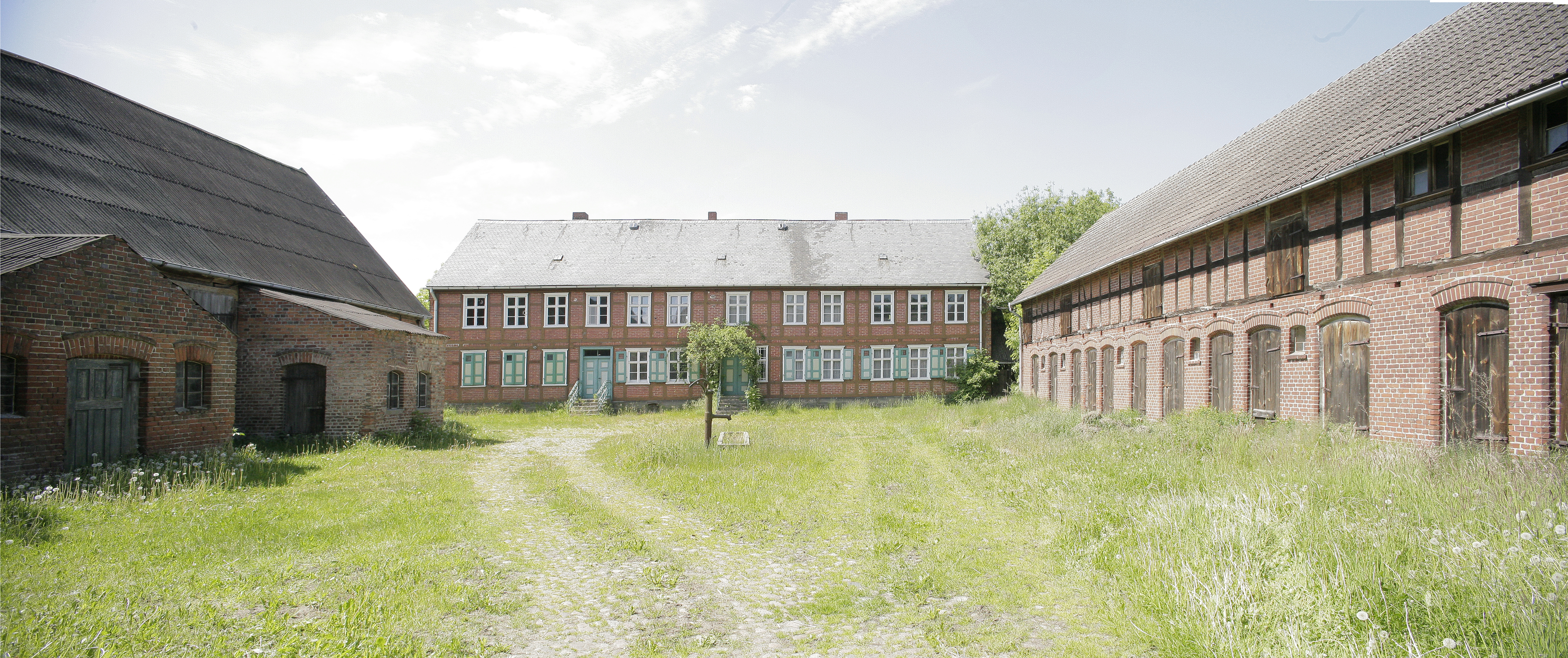 Frontal sieht man das Wohnhaus, jeweils links und rechts Stallgebäude. Dies ist in der Altmark typisch. Auch auf Ebene der Kamera befindet sich ein Stallgebäude mit Toreinfahrt.